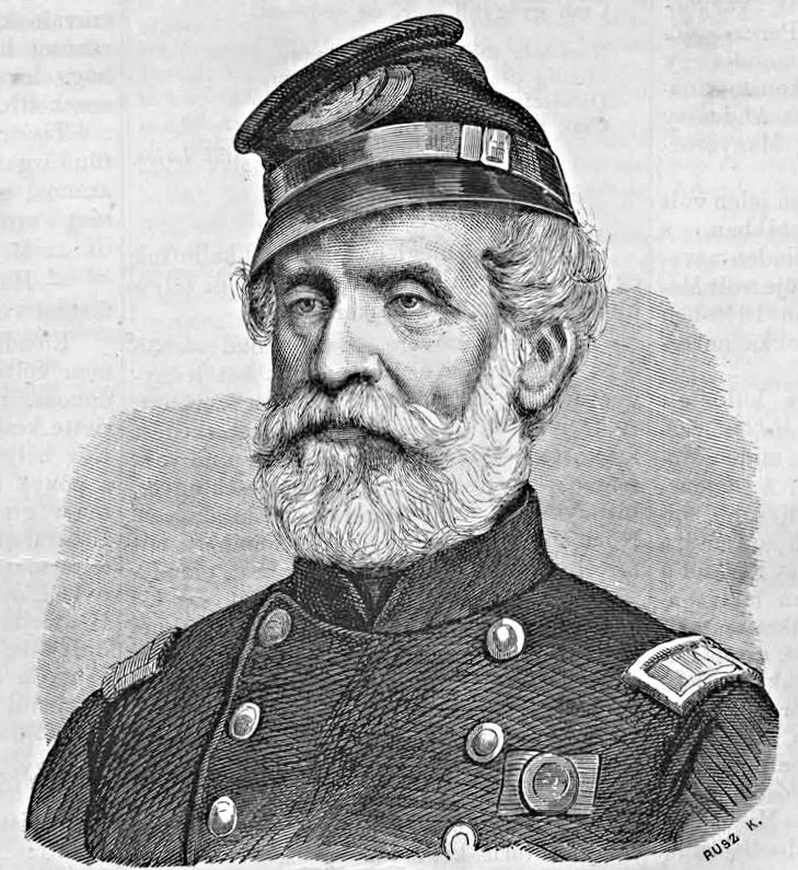 Perczel Miklós (1812–1904) ezredes amerikai dandárparancsnoki egyenruhában. Rusz Károly metszete (Vasárnapi Ujság, 1867. október 13.)